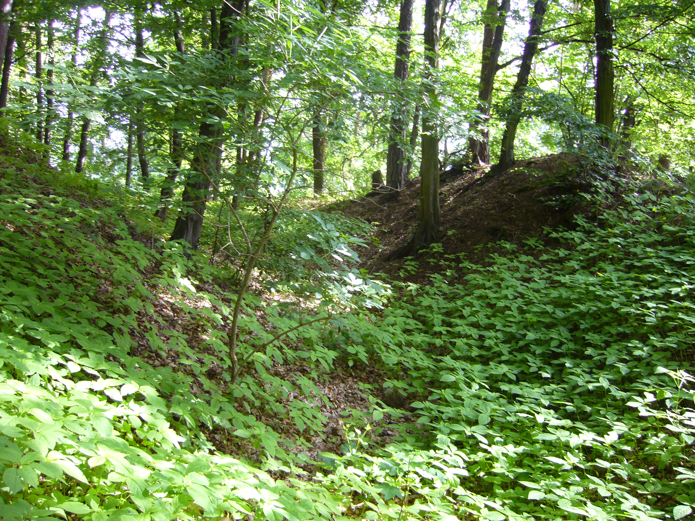 Zbytky valů na kopci Čepička.